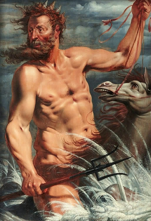 107.9 × 75.9 cm